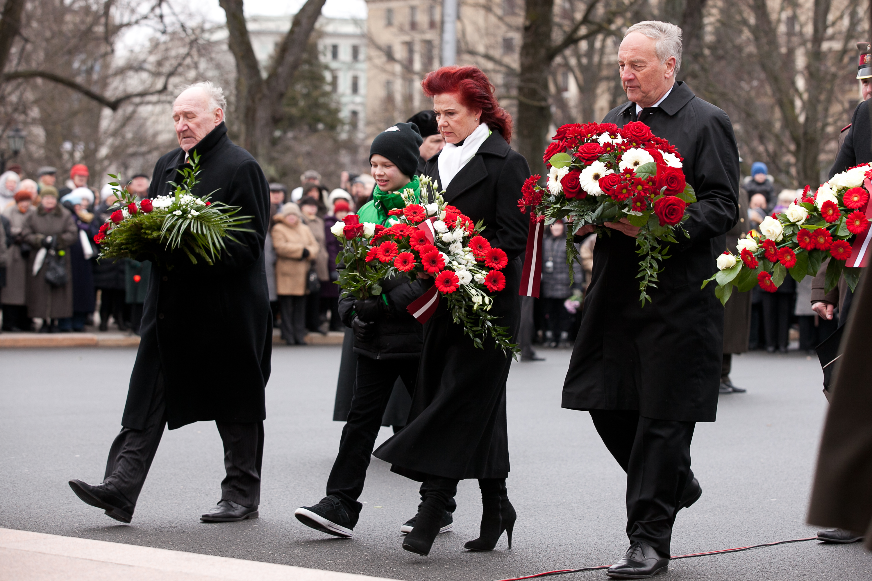 2012.gada 25.marts. Komunistiskā genocīda upuru piemiņai veltītā ziedu nolikšanas ceremonija. Foto: Ernests Dinka, Saeimas Kanceleja